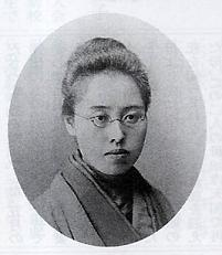 Wakamatsu Shizuko, Portrait